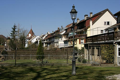 Unterer Graben von Sursee mit Blick zum Untertor